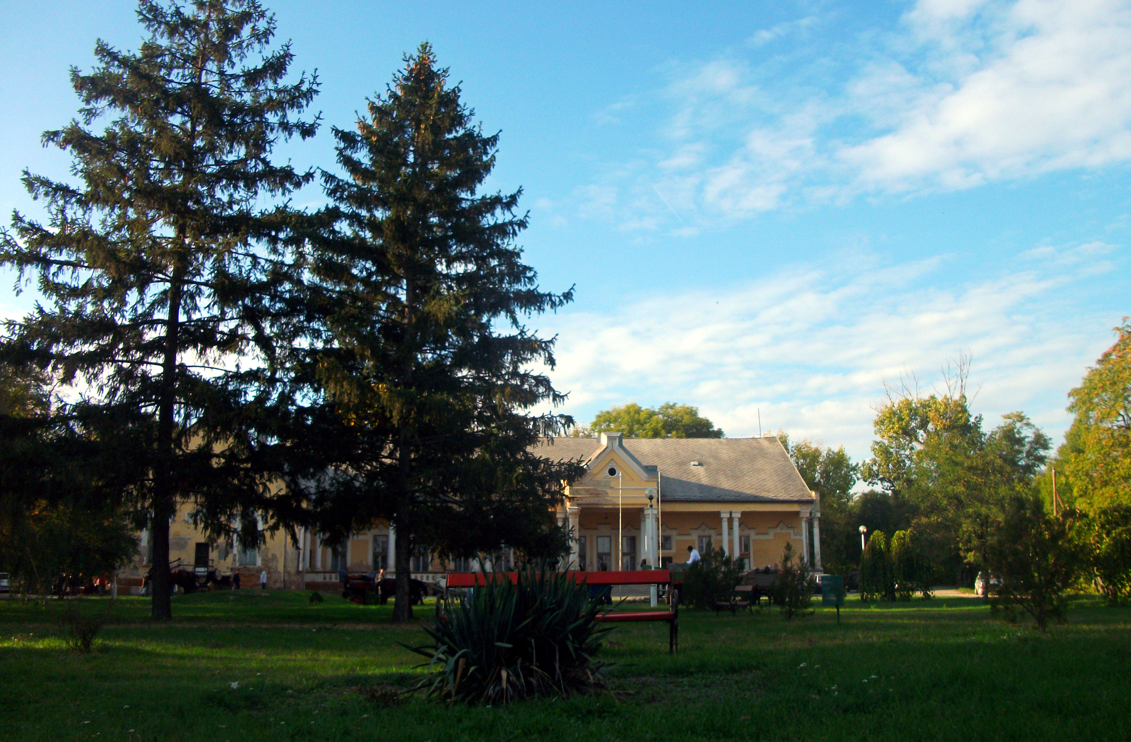 A Zichy-kastély a kastélykertből. (Zichyújfalu)